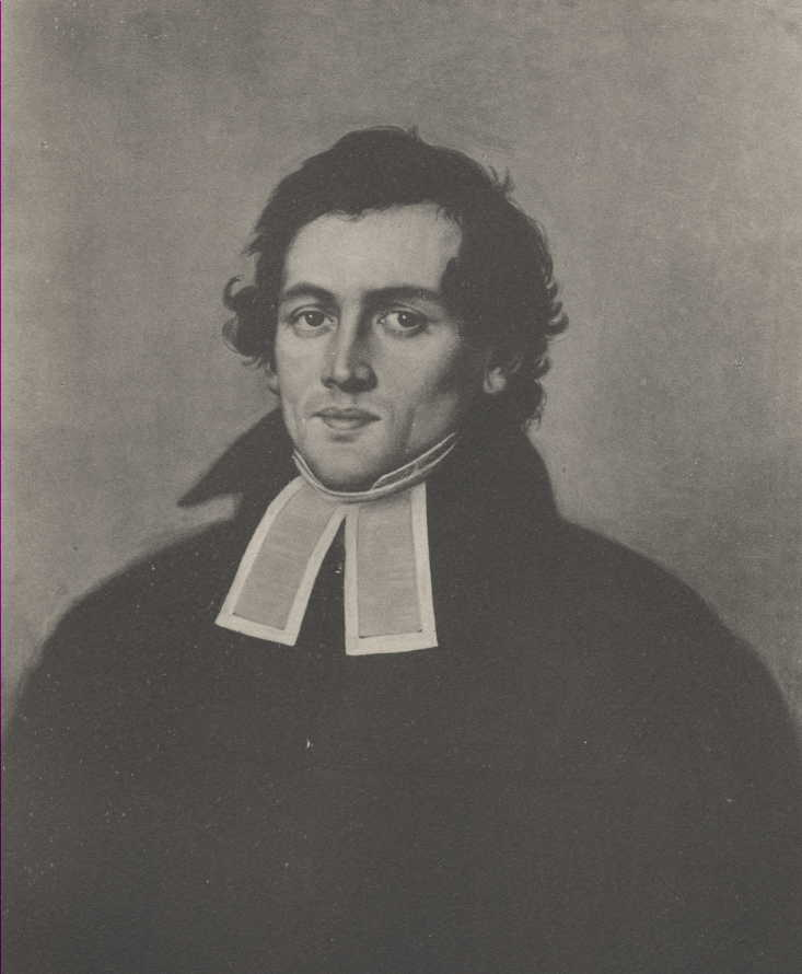 Bildnis Traugott Vogt (1808–1869)